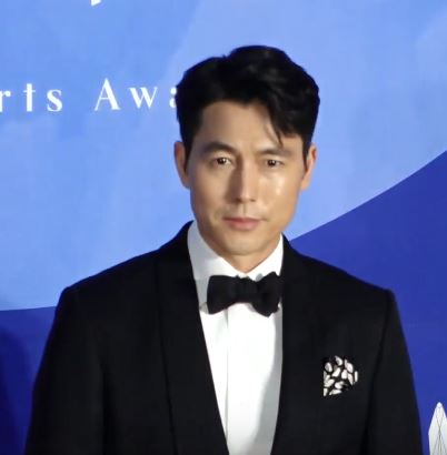 ‘제55회 백상예술대상’ 레드카펫이 1일 오후 서울 강남구 삼성동 코엑스에서 열렸다.